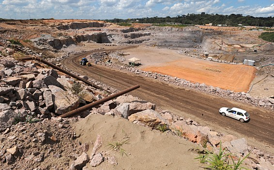 Porto Velho - Obras da Usina Hidrelétrica Santo Antônio, no Rio Madeira, em Rondônia, que receberá o início da concretagem da primeira casa de força Foto: Marcello Casal Jr./ABr